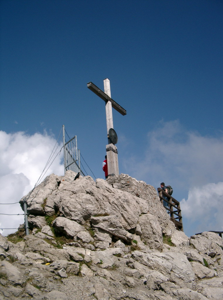 Nebelhornbahn Gipfel, selbst fotografiert, gemeinfrei Aufgenommen am 30-08-2002 um 14:59 von Markus Riesenbeck